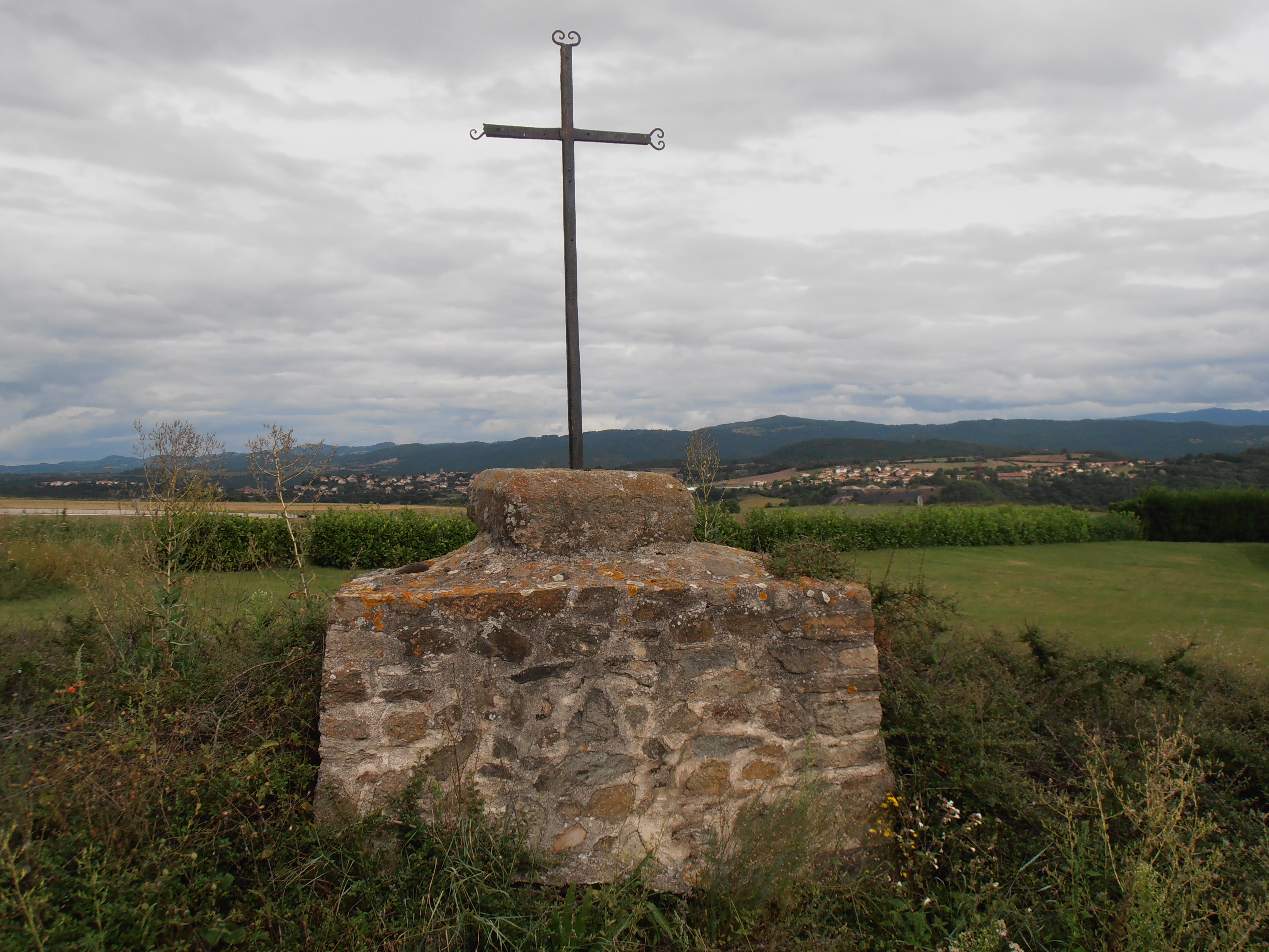 Site gallo-romain de la Croix de la Pierre (InscritClassé)